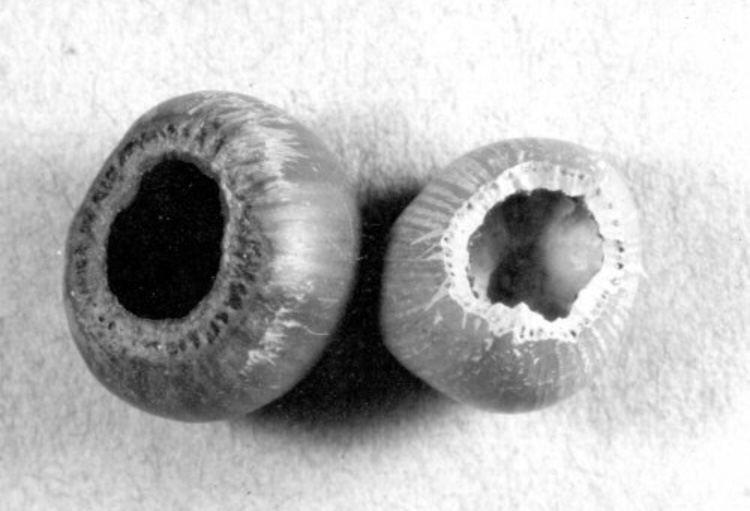 Dwy gneuen wedi eu hagor mewn caethiwed gan (yn eu trefn) llygoden y coed a llygoden bengron goch